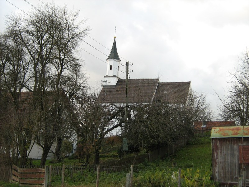 Kath. Kapelle St. Valentinus in Katzenthal